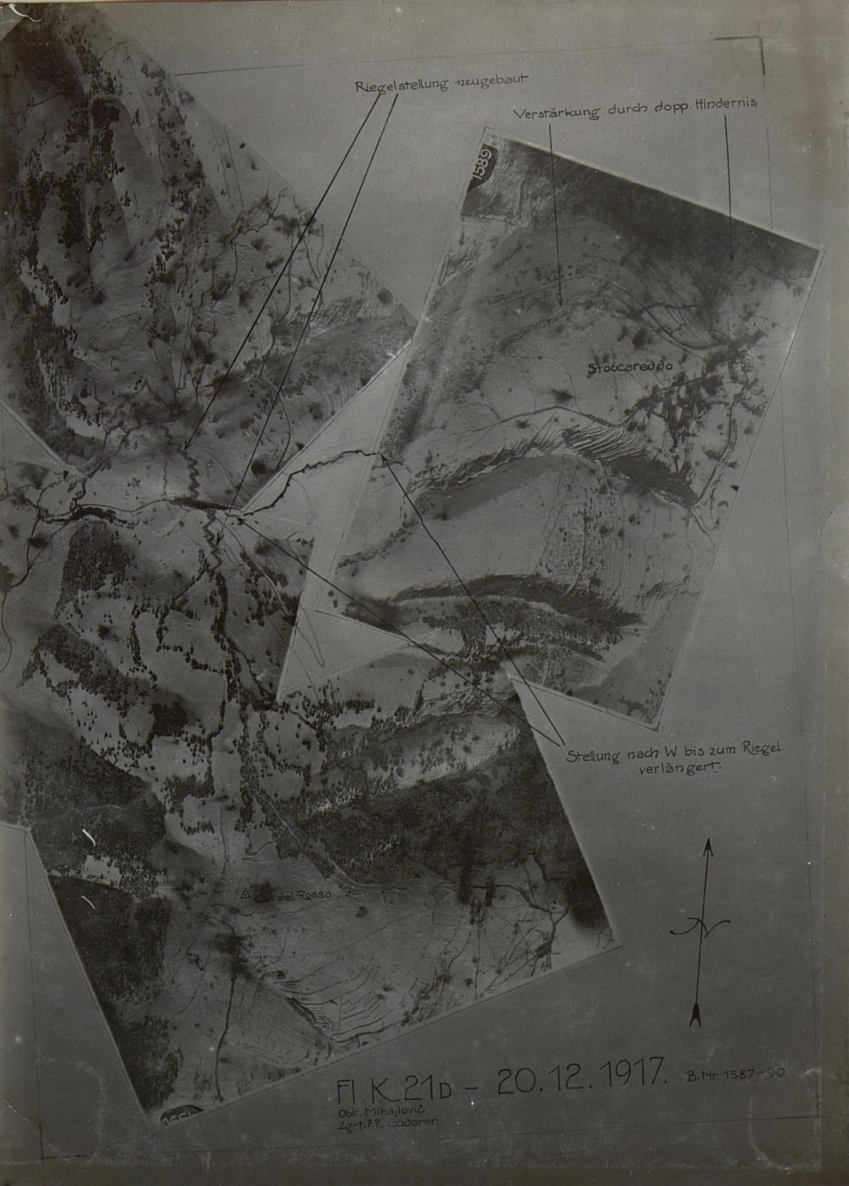 Fliegeraufnahme: Riegelstellung: Col del Rosso-Stoccaredo.